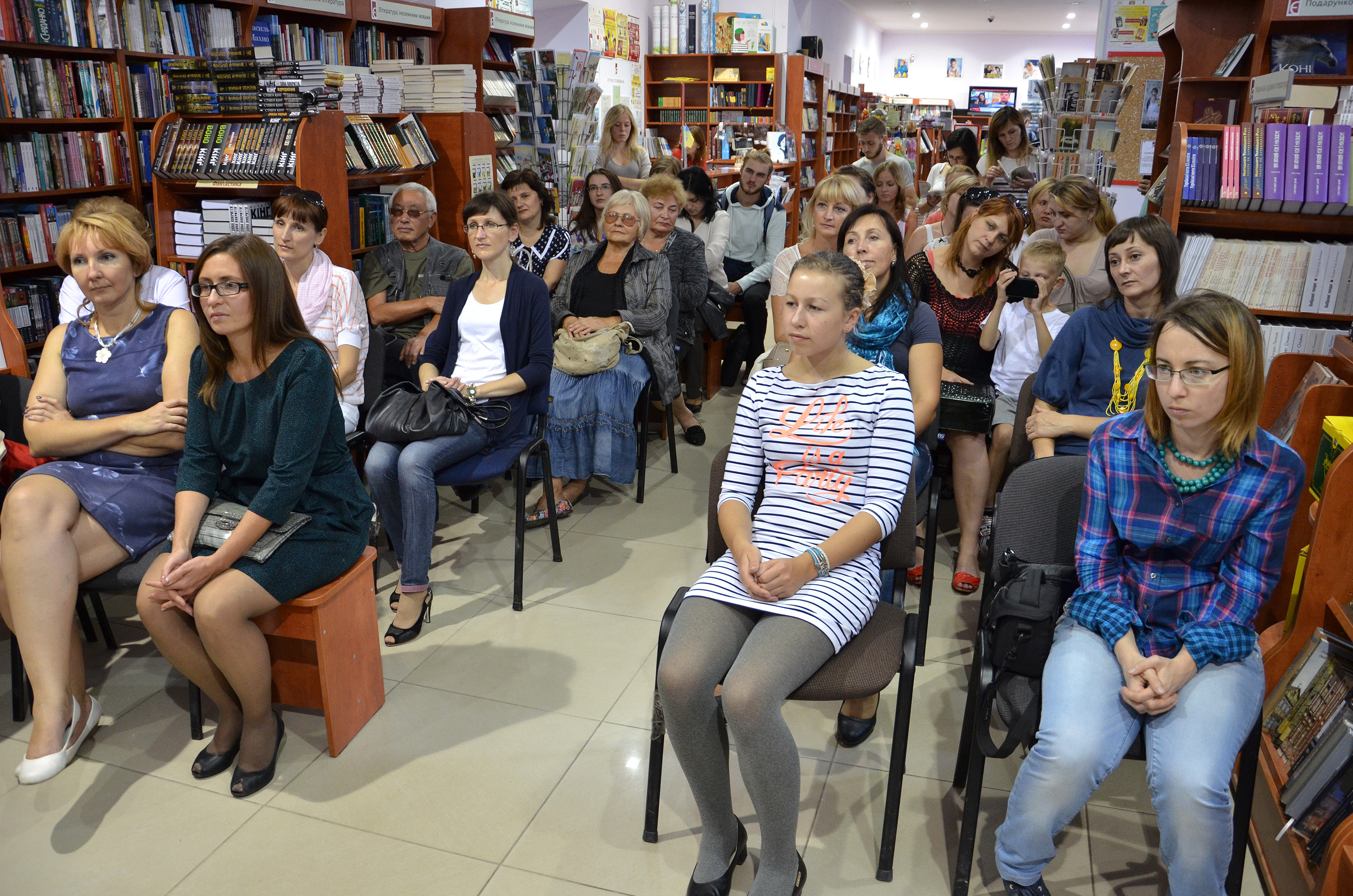 Презентація книжки новел і замальовок української письменниці Ірина Мацко «Шпинат для мізків» у «Книгарні “Є”» в Тернополі 17 вересня 2015 року. Серед присутніх літературознавець Тетяна Дігай, журналістка «Вільного життя плюс» Мар’яна Бобрівець (крайня справа).